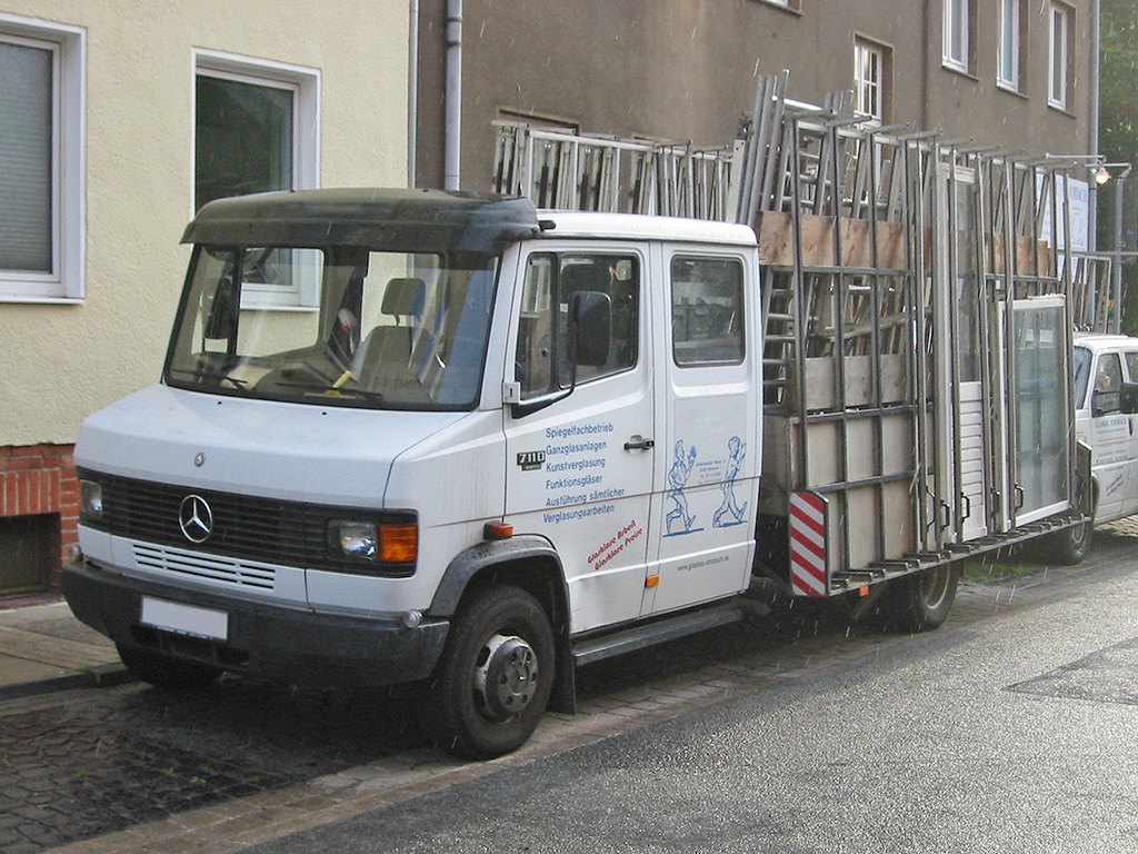 Mercedes-Benz T 2